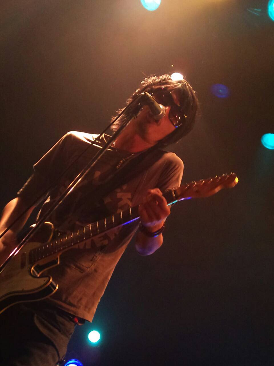 久保博三ボーカル